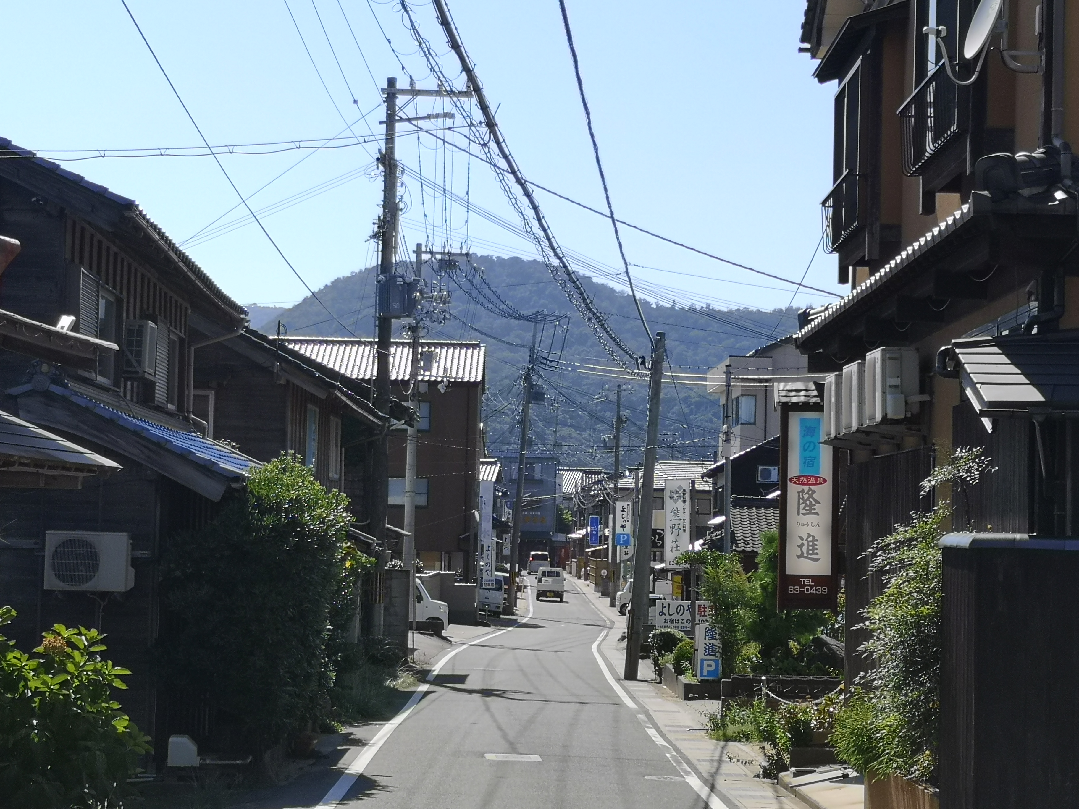 京丹後市久美浜町の砂州、小天橋上に展開する旅館街